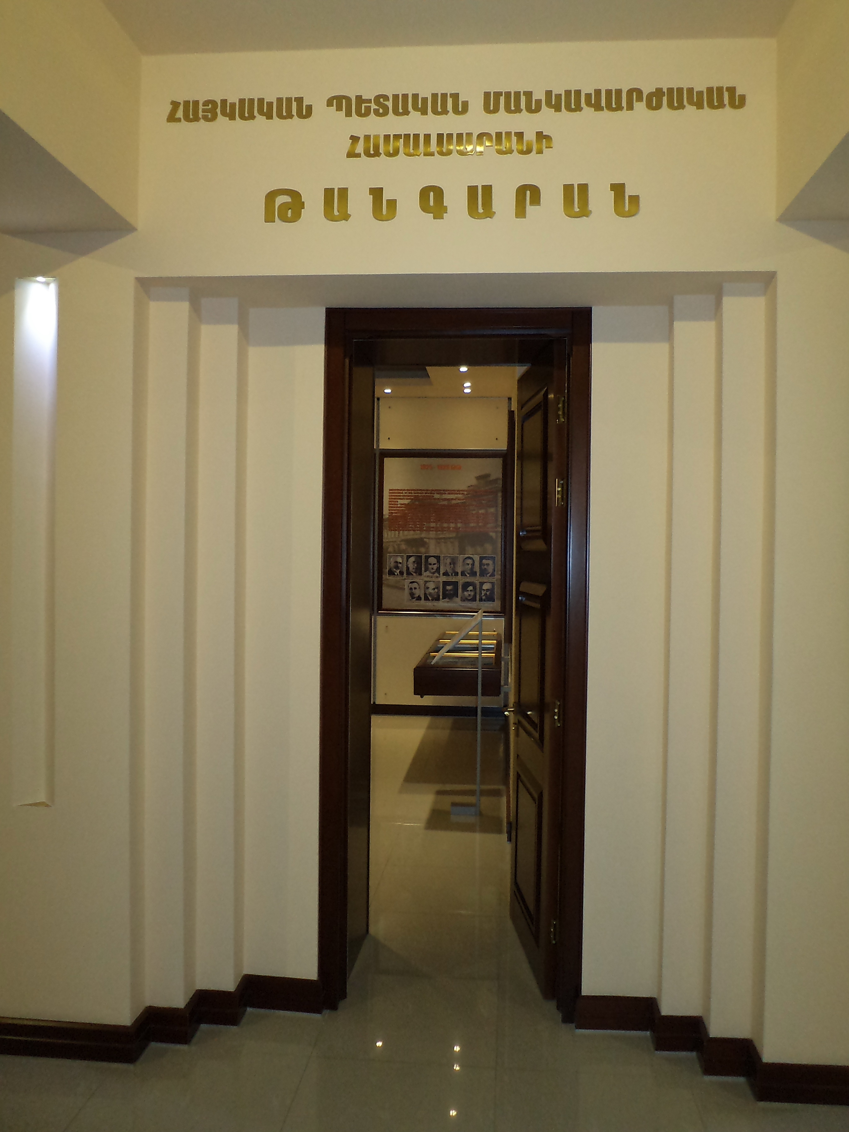 Խաչատուր Աբովյանի անվան հայկական պետական մանկավարժական համալսարանի թանգարան